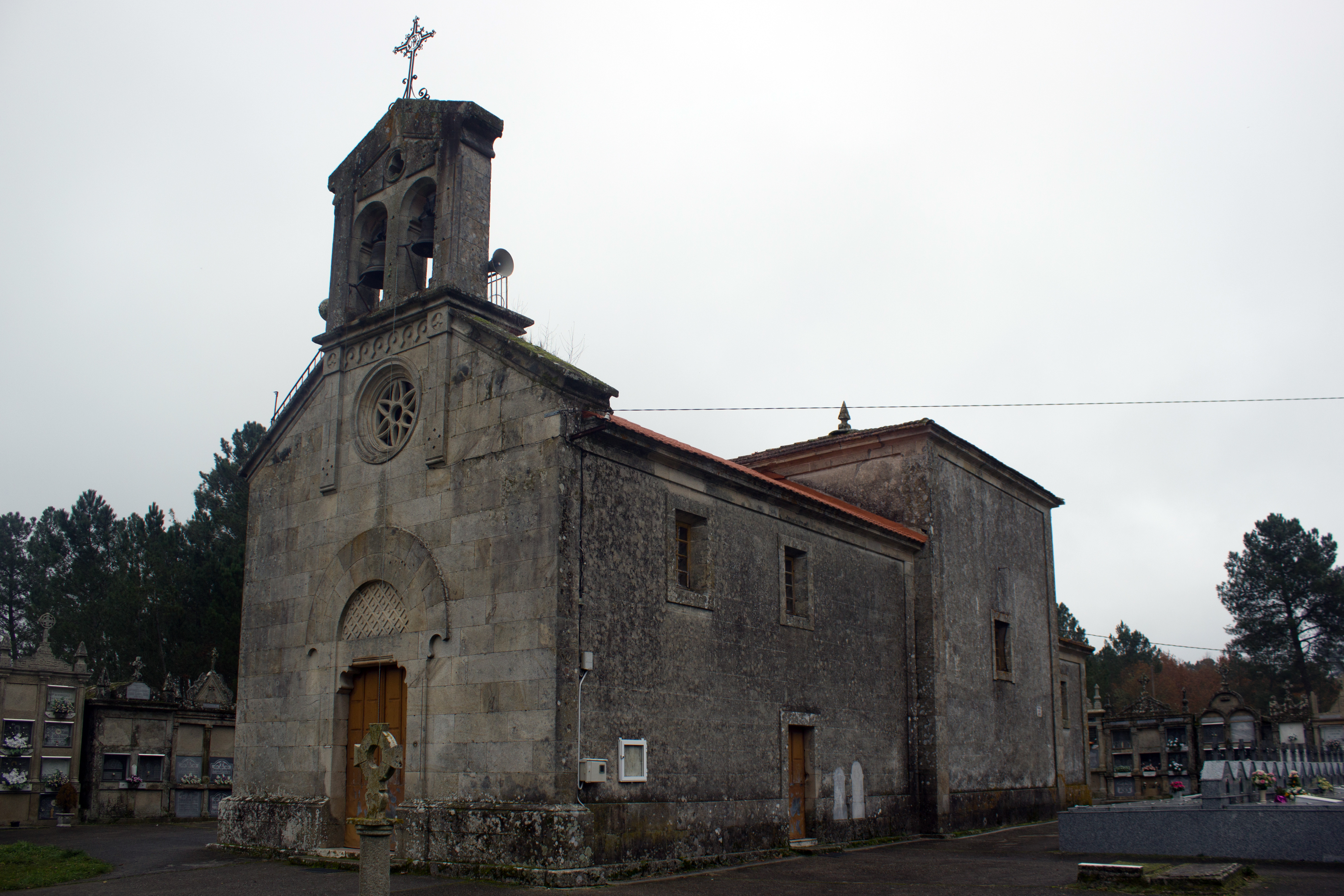 Igrexa de San Martiño do Lago, no concello de Maside.